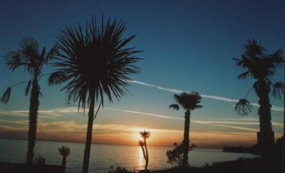 A beach in Abkhazia